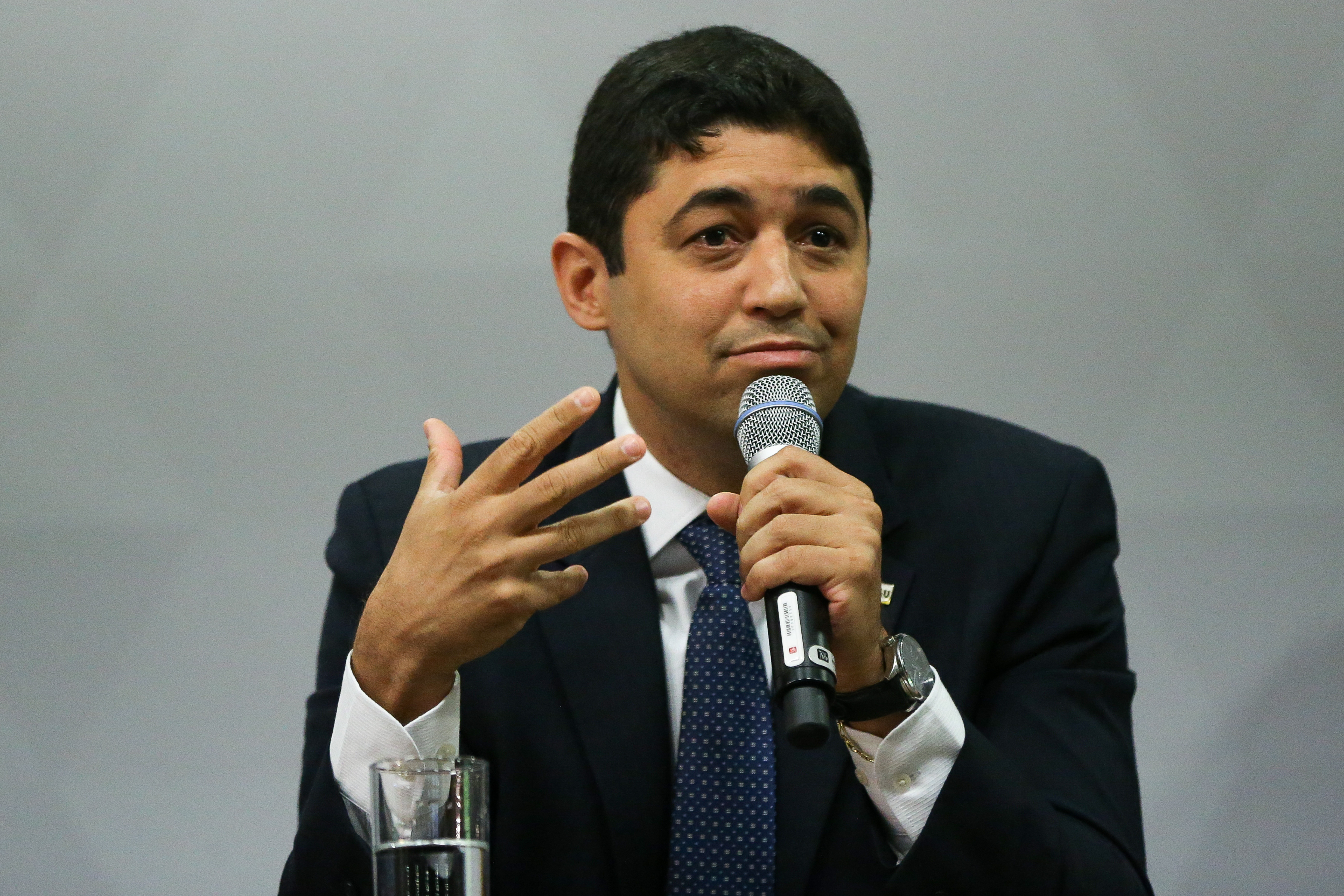 Brasília - O ministro da Transparência e Controladoria-Geral da União, Wagner Rosário, durante lançamento da campanha Todos juntos contra a corrupção, no Conselho Nacional do Ministério Público (Marcelo Camargo/Agência Brasil)